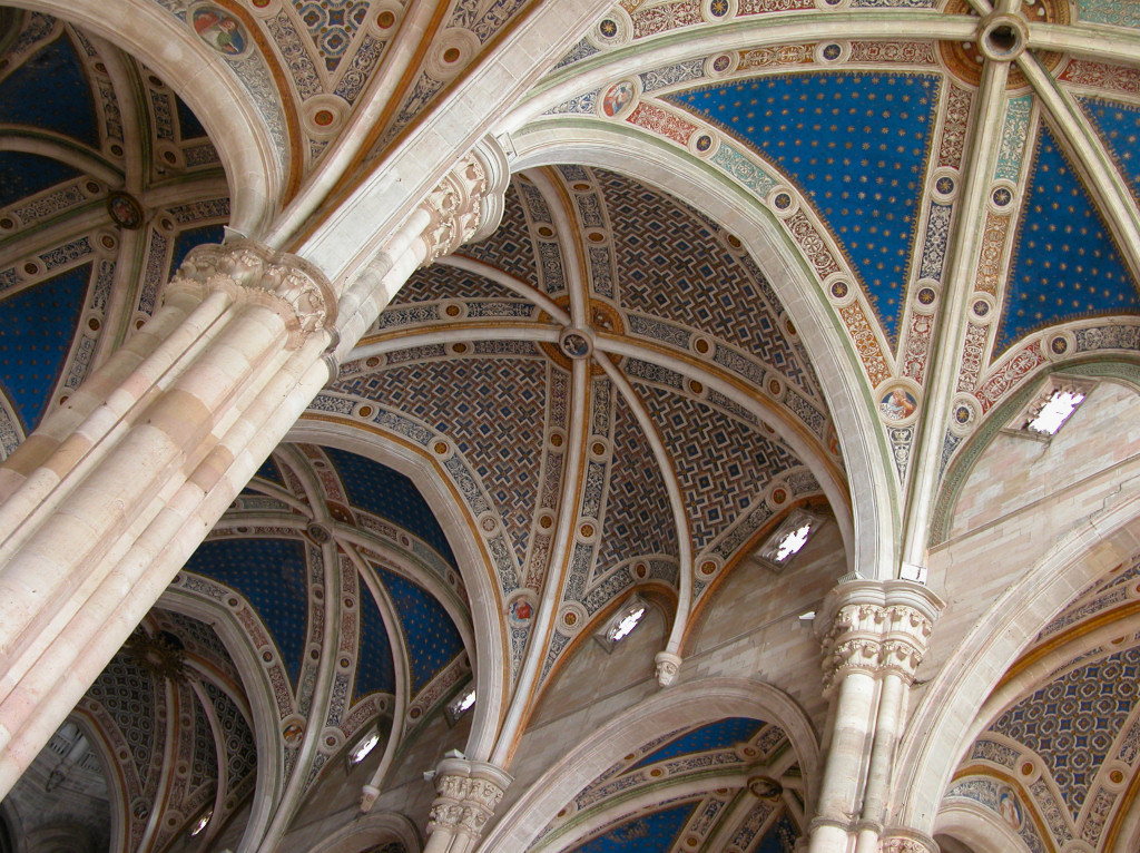 Certosa di Pavia. Foto da me realizzata.